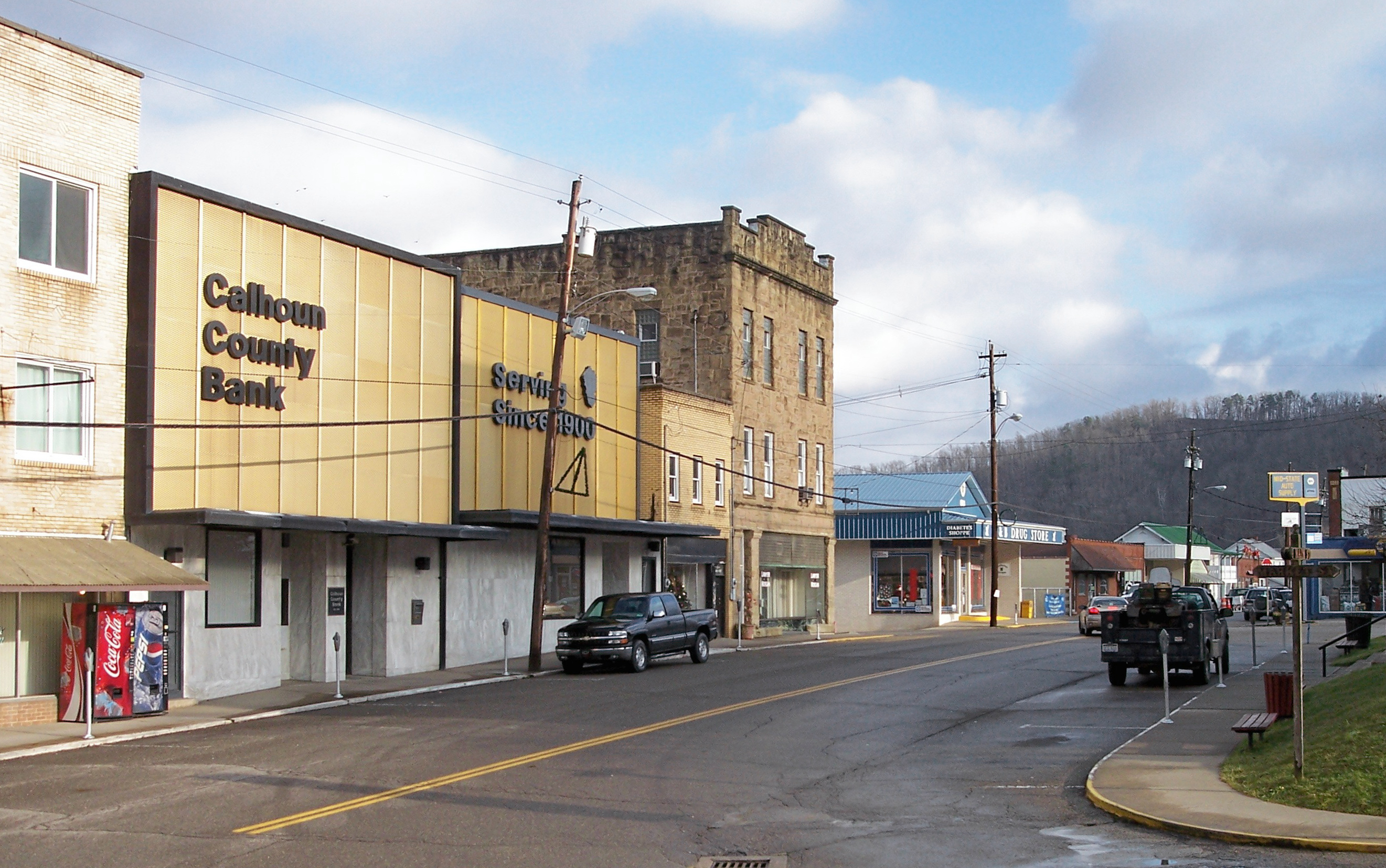 Main Street in Grantsville, West Virginia